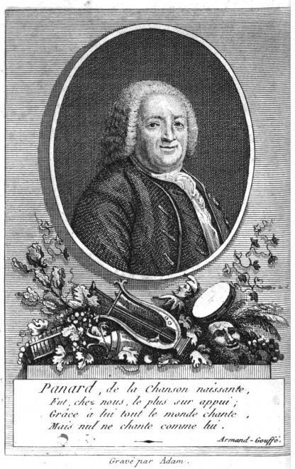 Portrait de Charles-François Panard